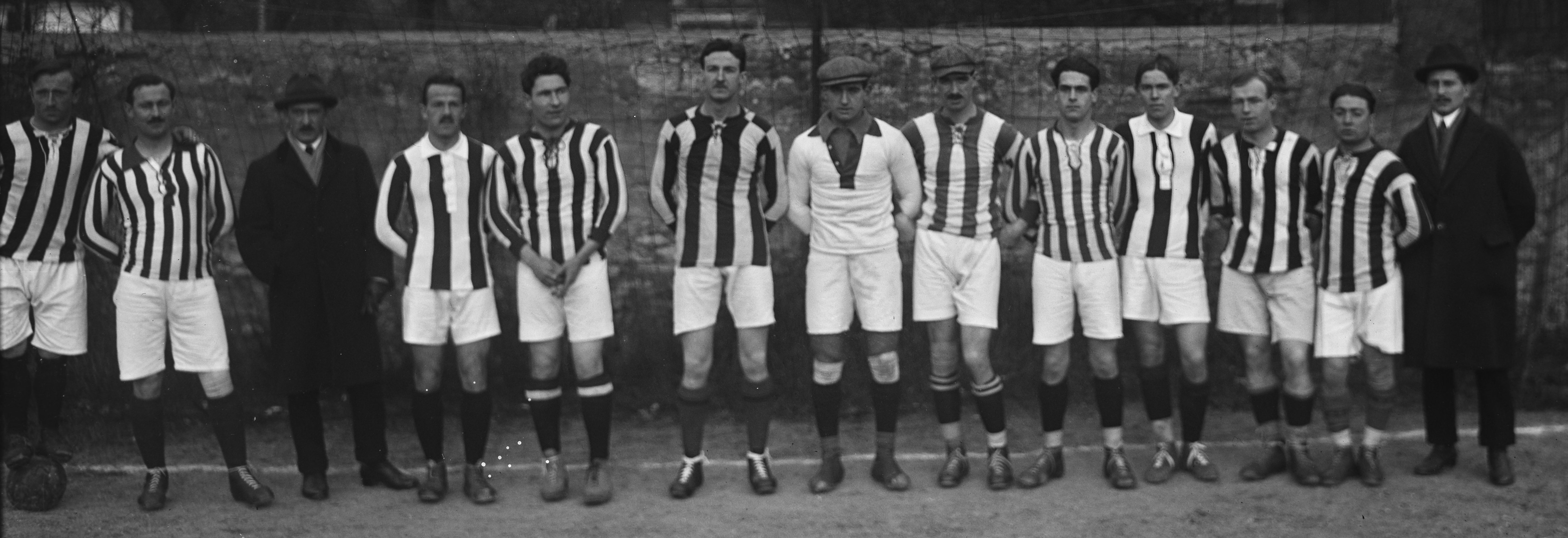 Football association, 12/12/20, football club Urania de Genève, stade de la rue Olivier-de-Serres.